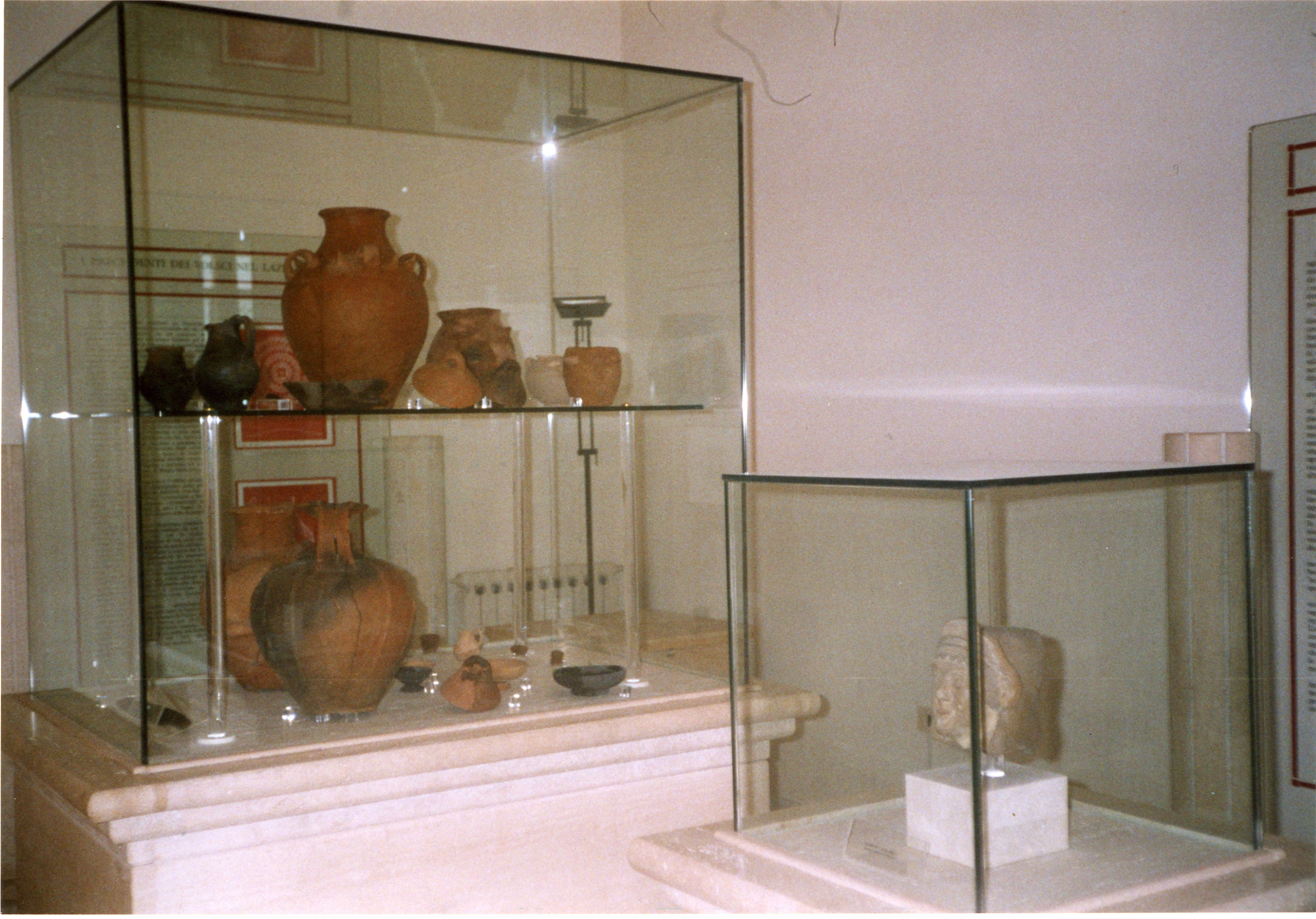 sono io l'autore della foto, rappresenta alcuni rari e importantisismi reperti acheologici della mia città GFDL e Creative Commons CC-BY-SA-2.5, SONO L'AUTORE